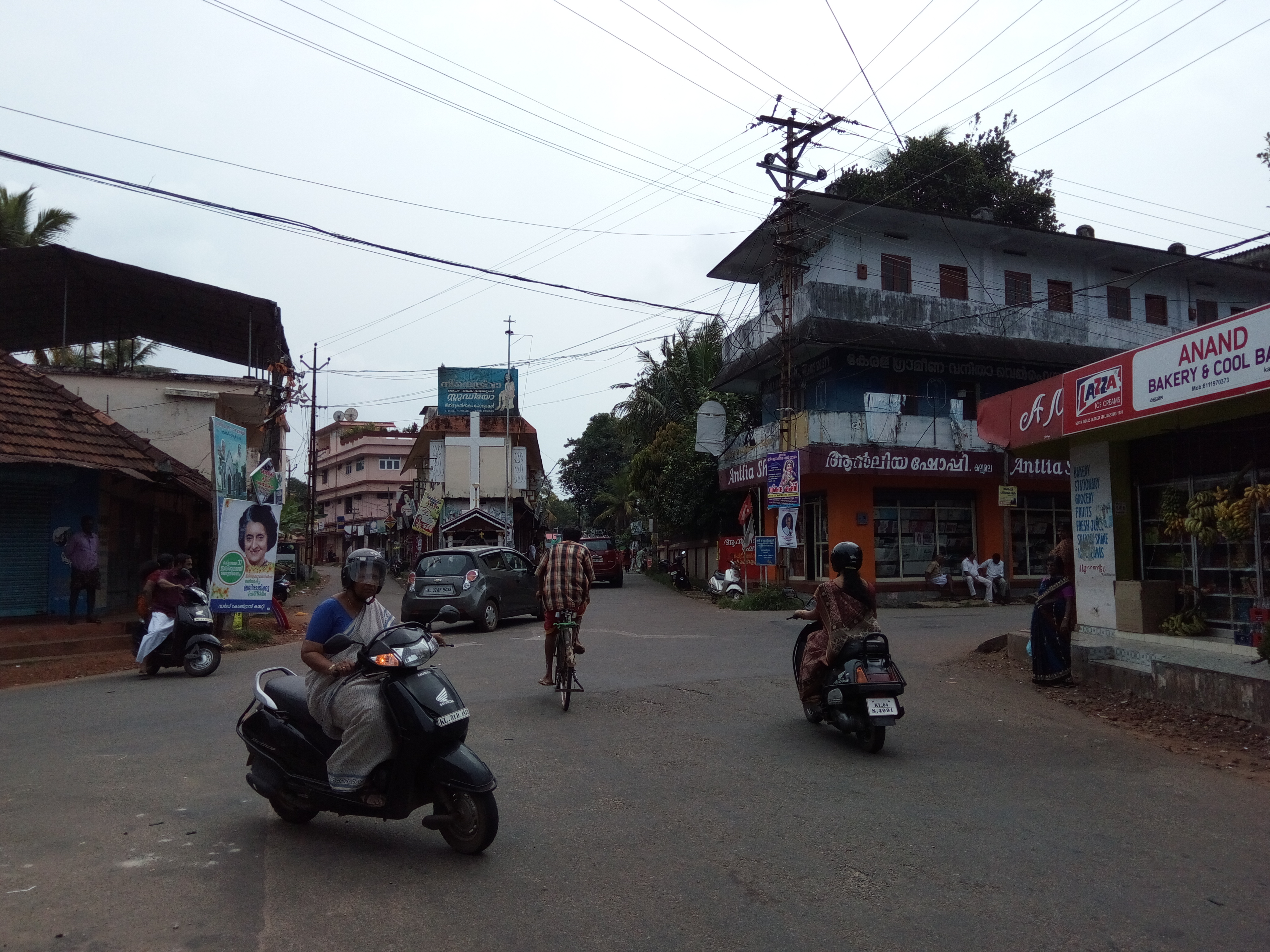 Kallumala college junction